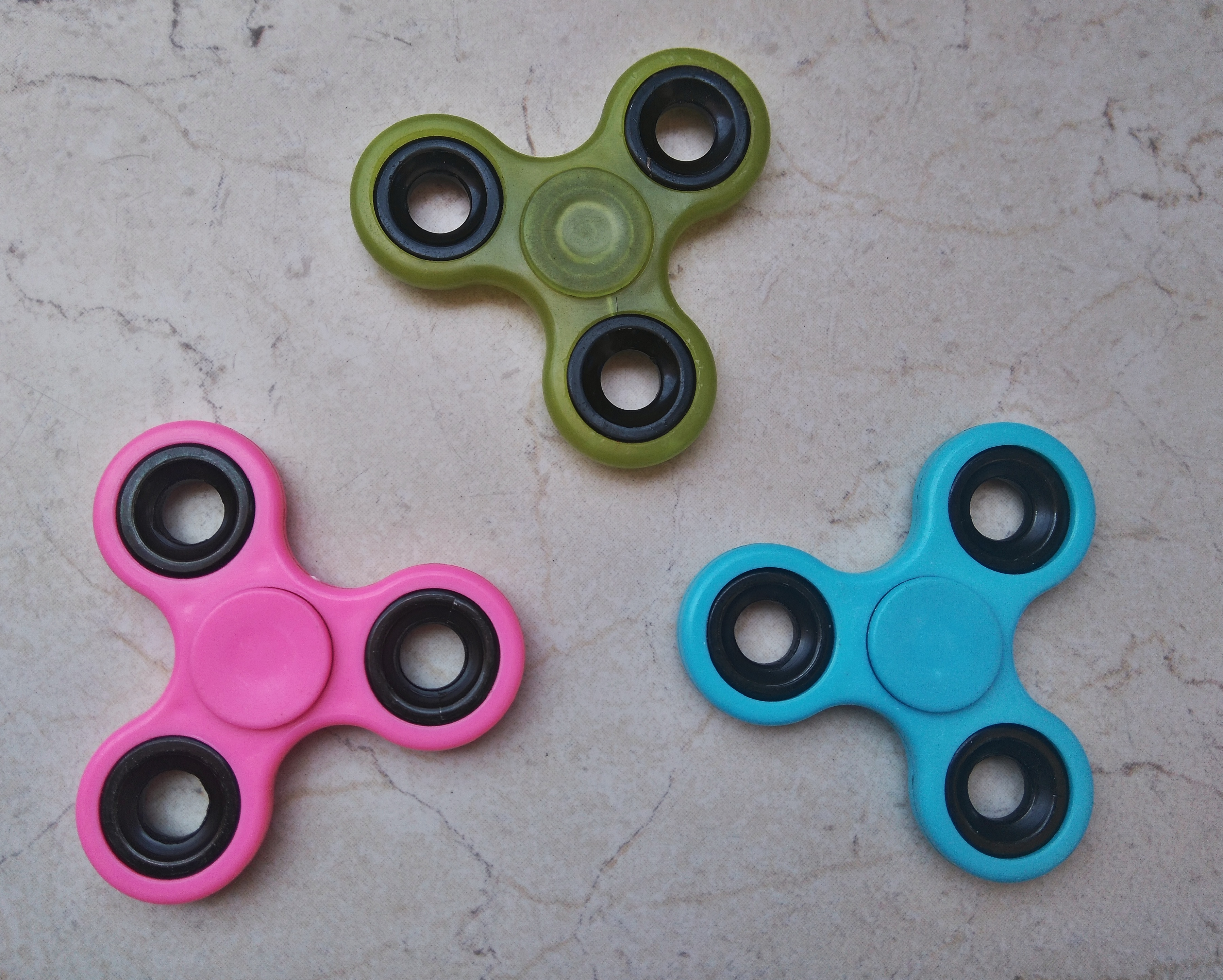 Fidget spinners